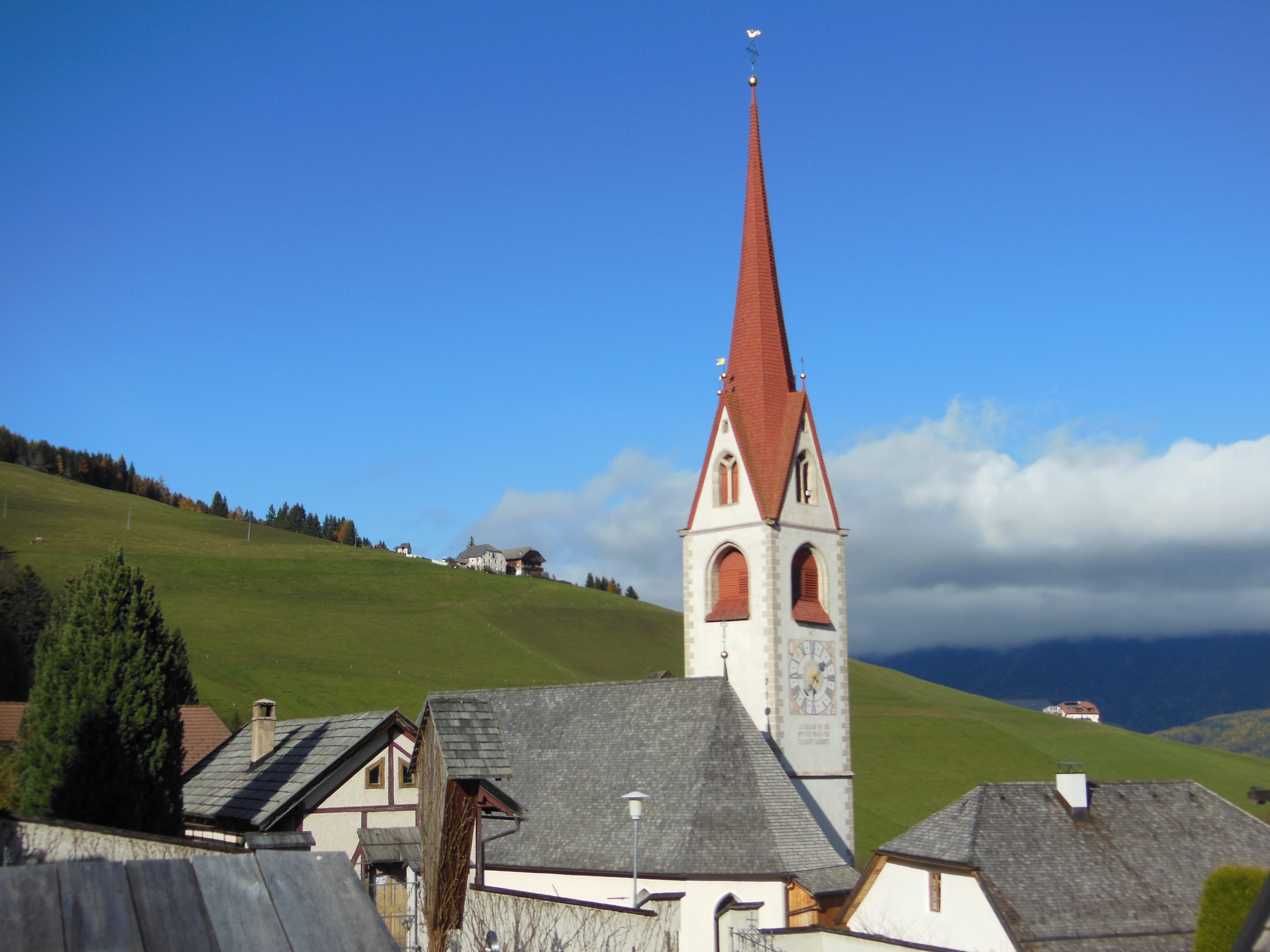 Pfarrkirche St. Wolfgang in Geiselsberg (Gemeinde Olang, Südtirol) von Südost